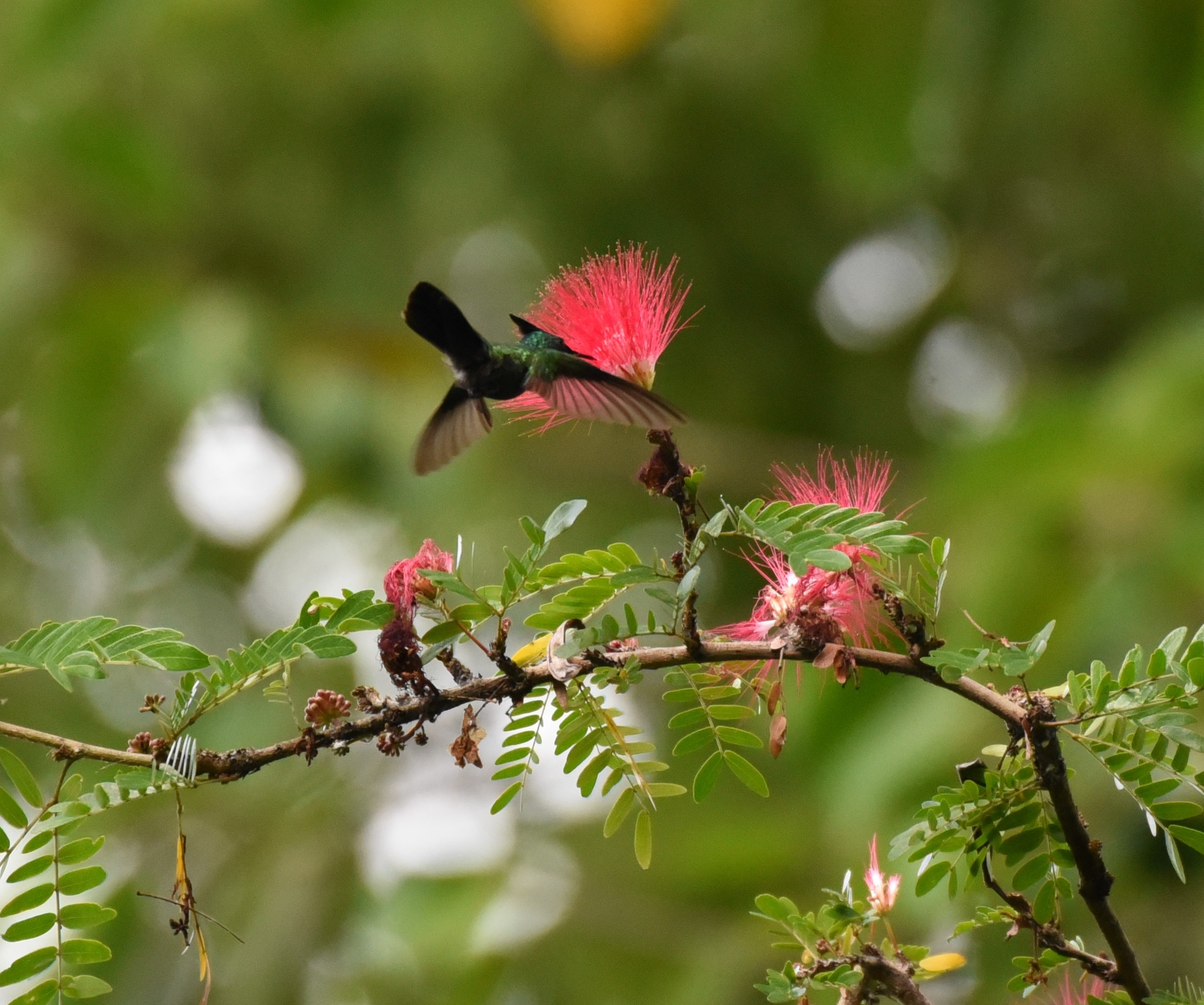 Antillenhaubenkolibri Orthorhyncus cristatus Aufgenommen im Botanic Gardens, Roseau, Dominica